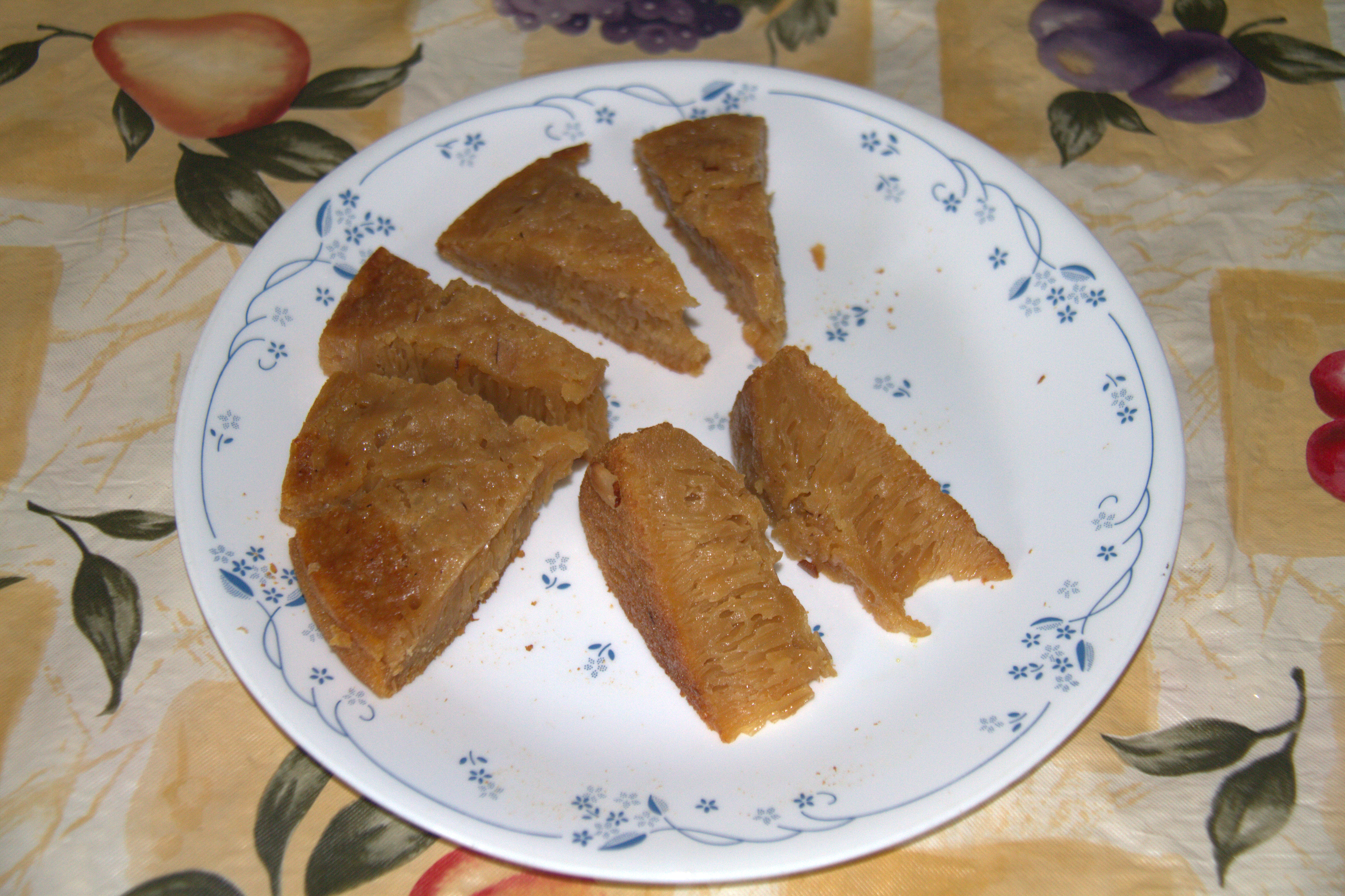 കലത്തപ്പം - ഉത്തര മലബാർ